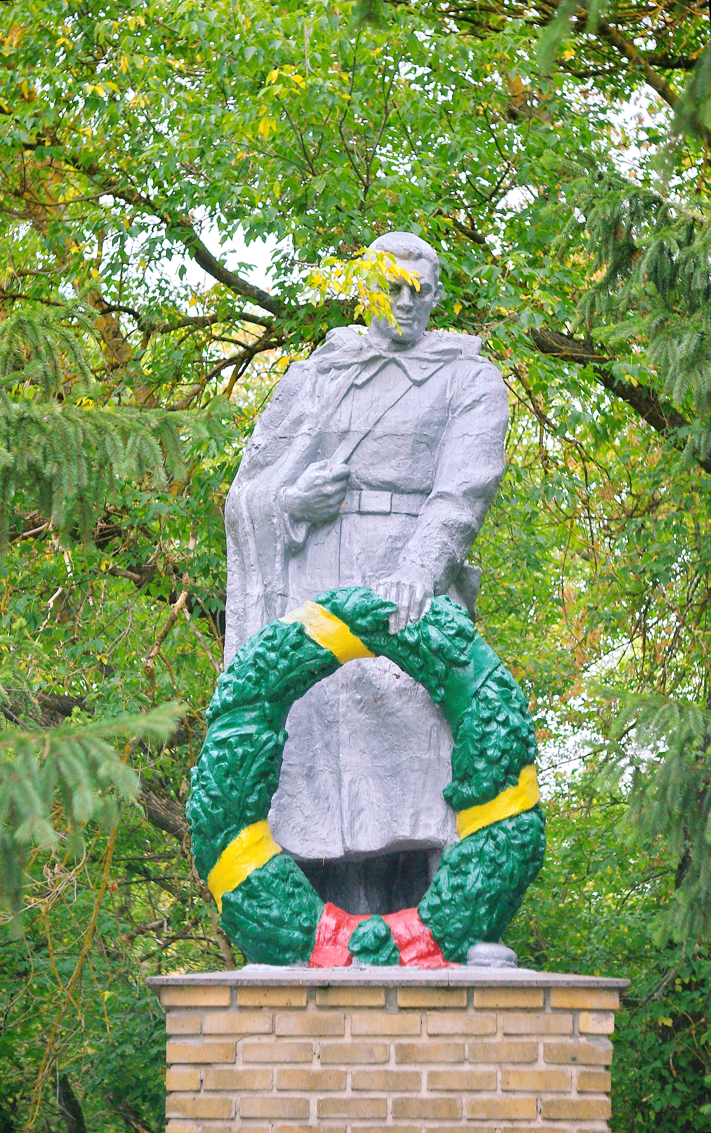 Братська могила радянських воїнів і партизанів. Поховано 250 воїнів., Співаківка (Червоний Шахтар)